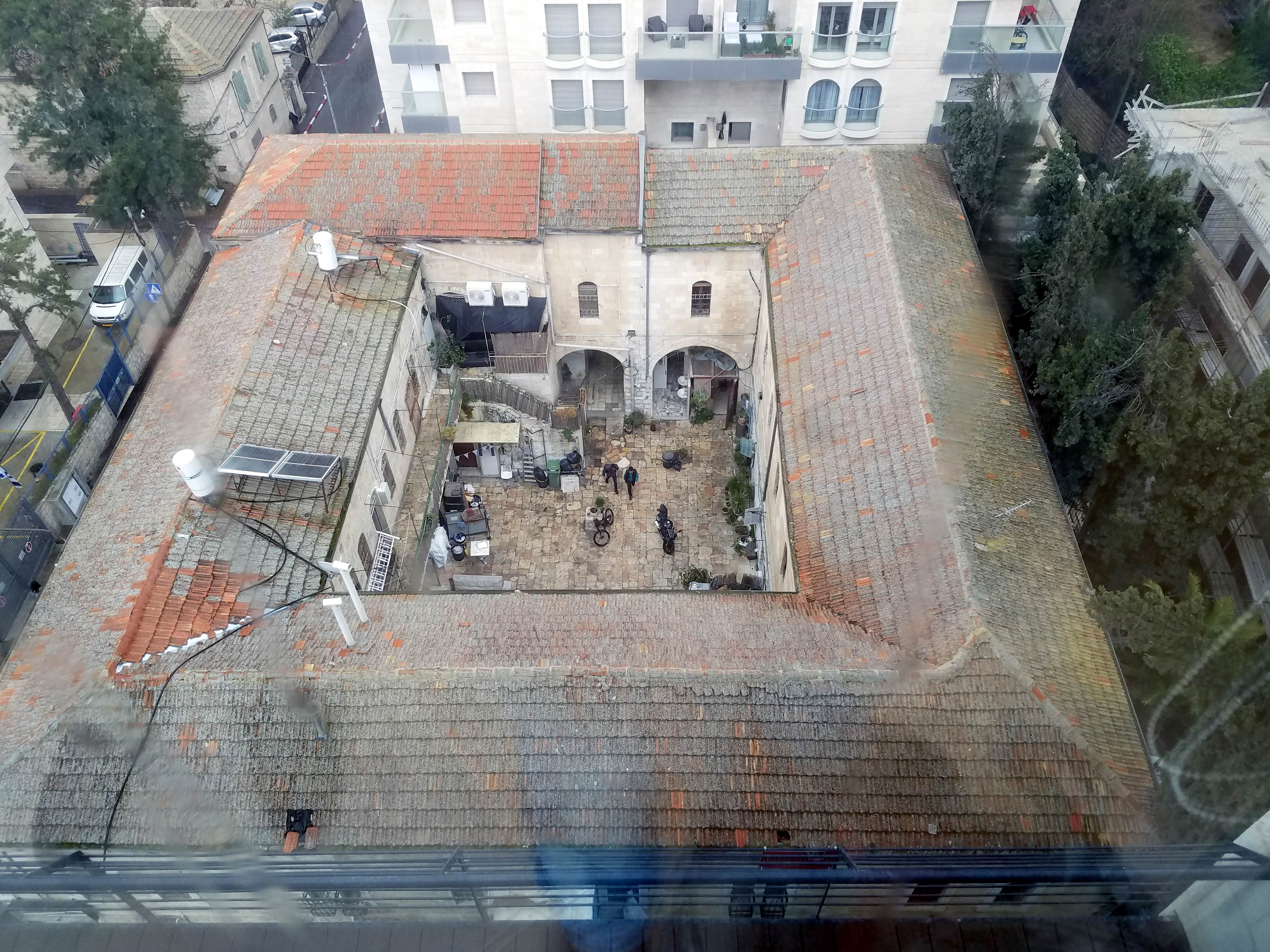 Beit David Neighberhood, Jesrusalem